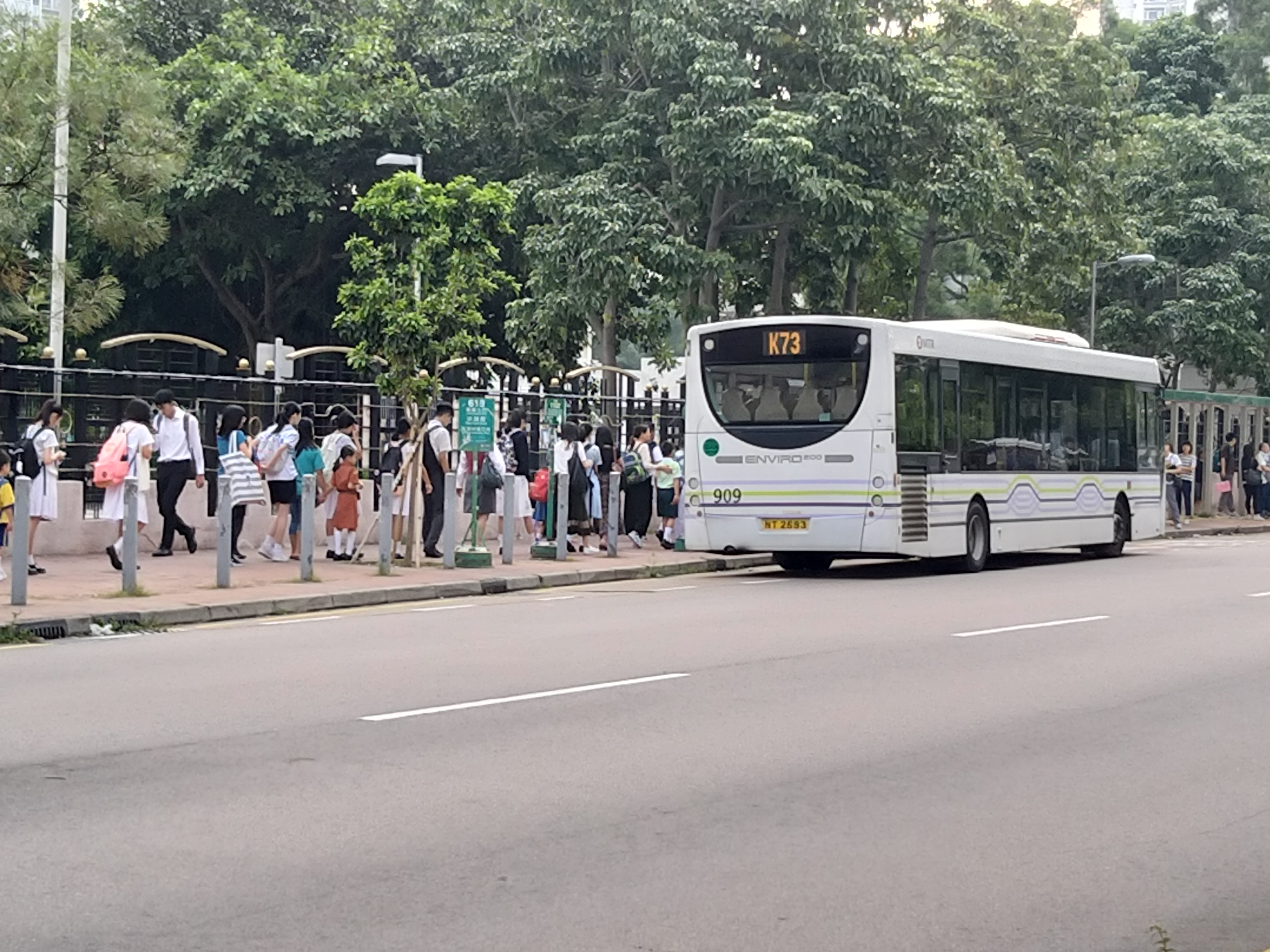 早上繁忙時間在天晴邨附近開出的特別班次